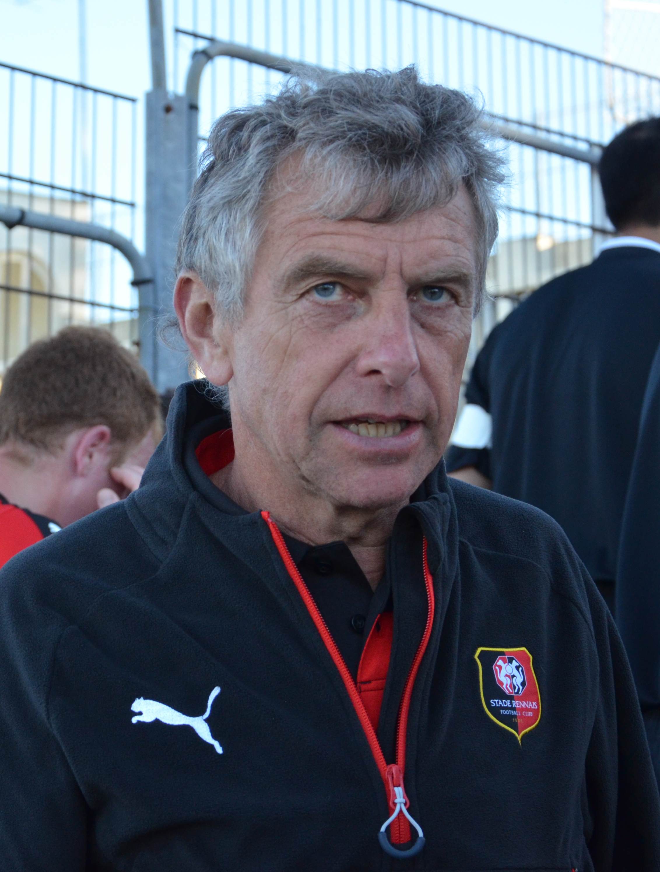 Photographie prise lors du match opposant le Stade rennais à l'USM Alger en match amical au stade Paul-Audrin de Dinard le 16 juillet 2016. Ici, Christian Gourcuff.